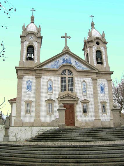 Igreja de Rio Tinto - Gondomar - Portugal